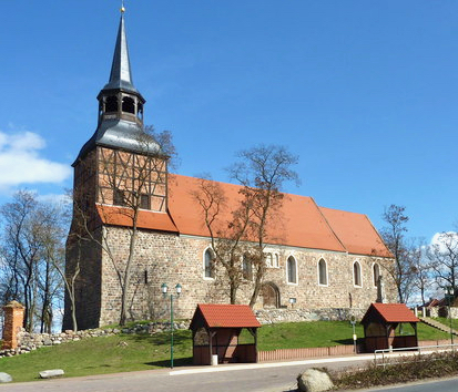 Denkmalgeschützte Kirche in Schmölln, Landkreis Uckermark, Gemeinde Randowtal.